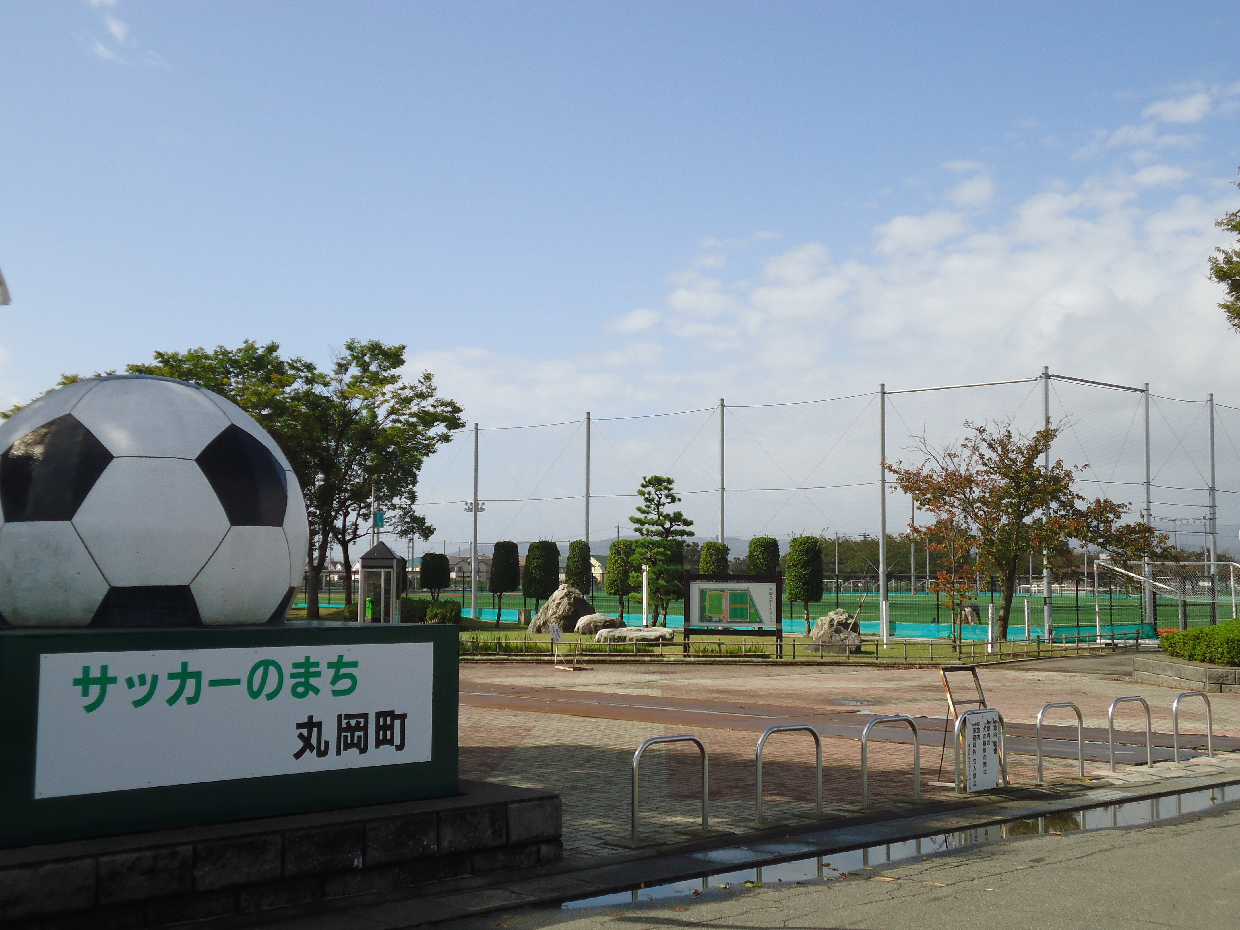 正面モニュメント